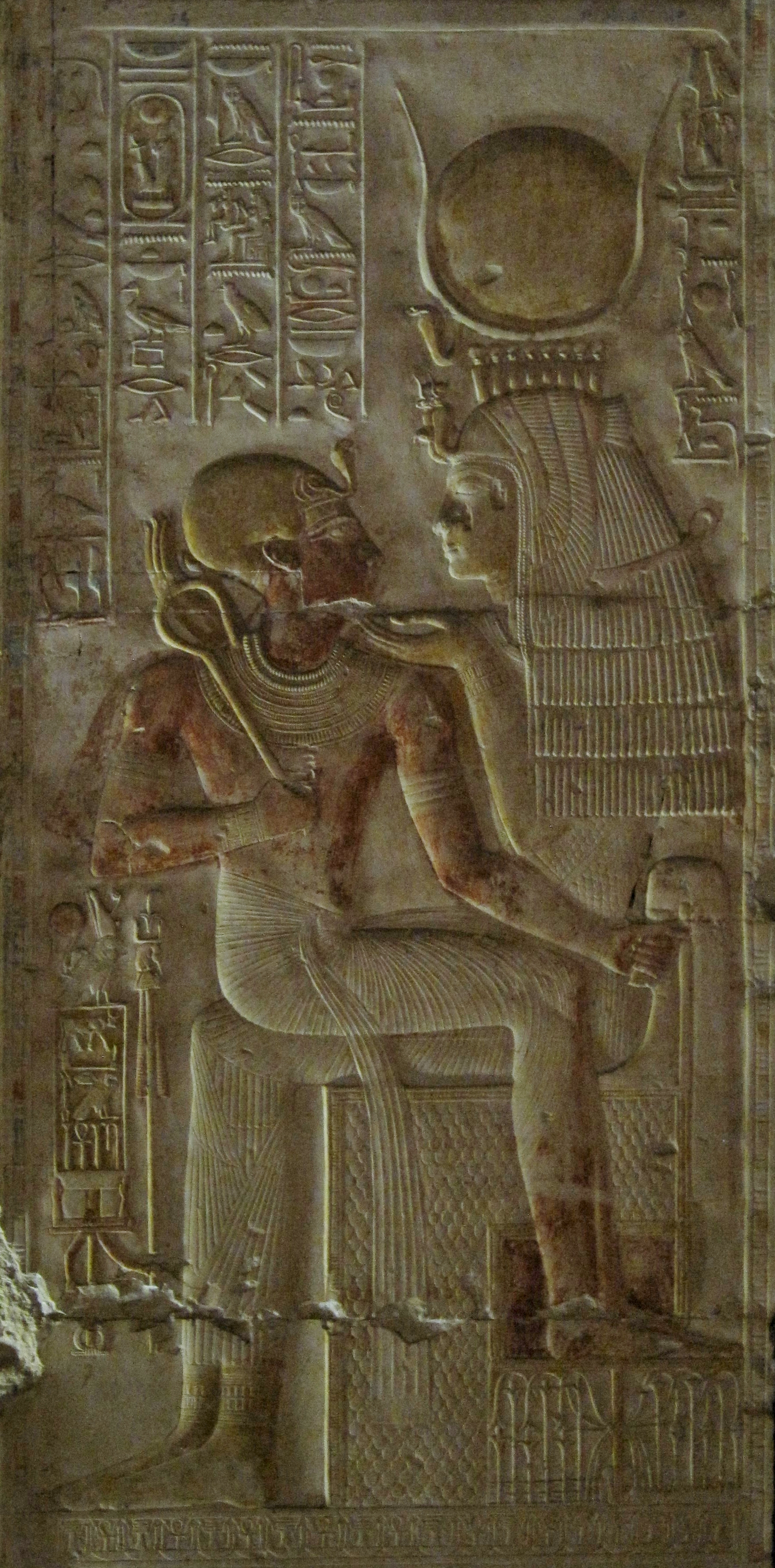 Relief der Göttin Isis mit Sethos I. im Totentempel Sethos I. in Abydos, Ägypten